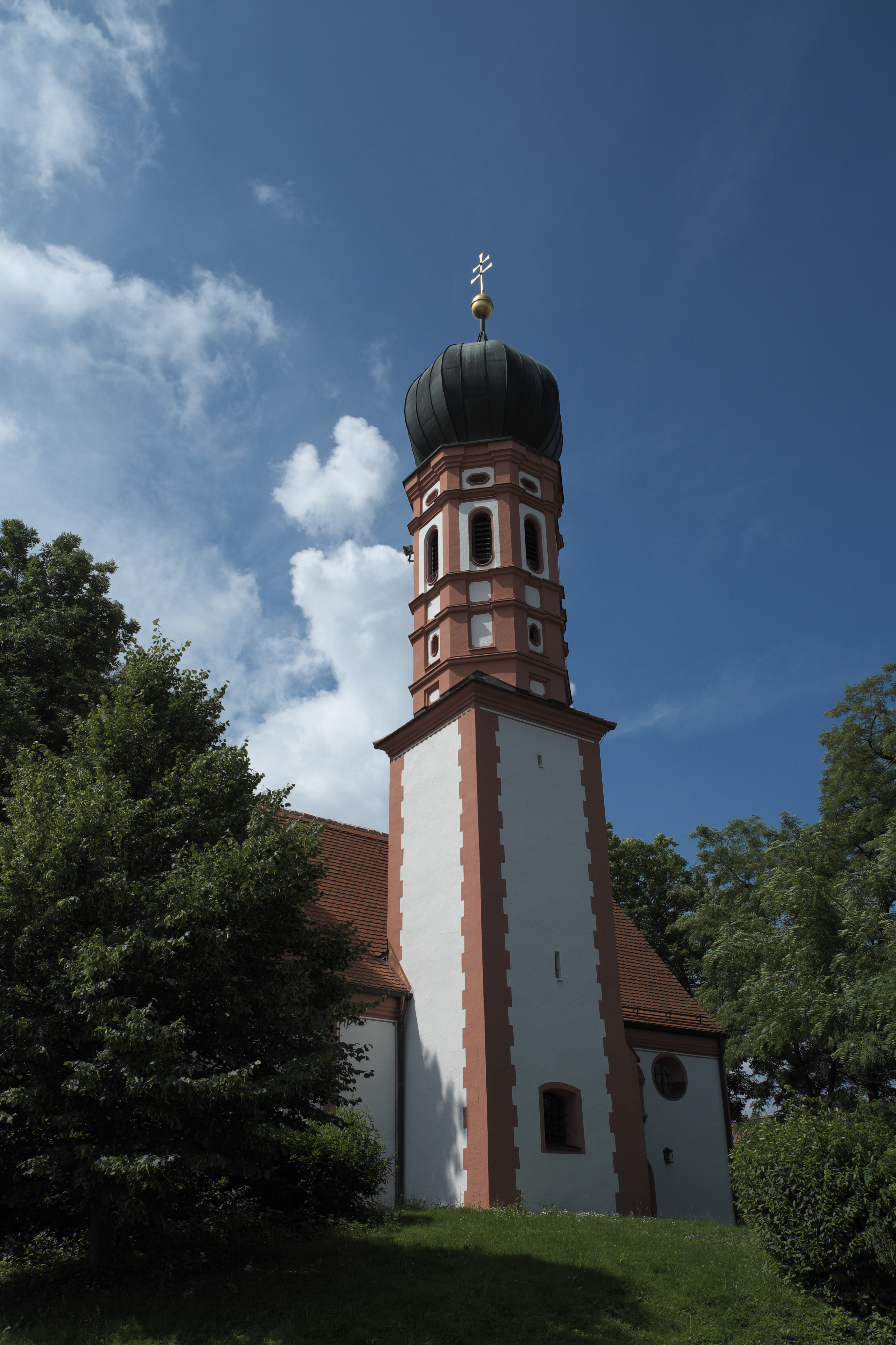 Katholische Filialkirche St. Stephan in Stefansberg, einem Ortsteil von Maisach im Landkreis Fürstenfeldbruck (Bayern/Deutschland), Glockenturm mit Zwiebelhaube